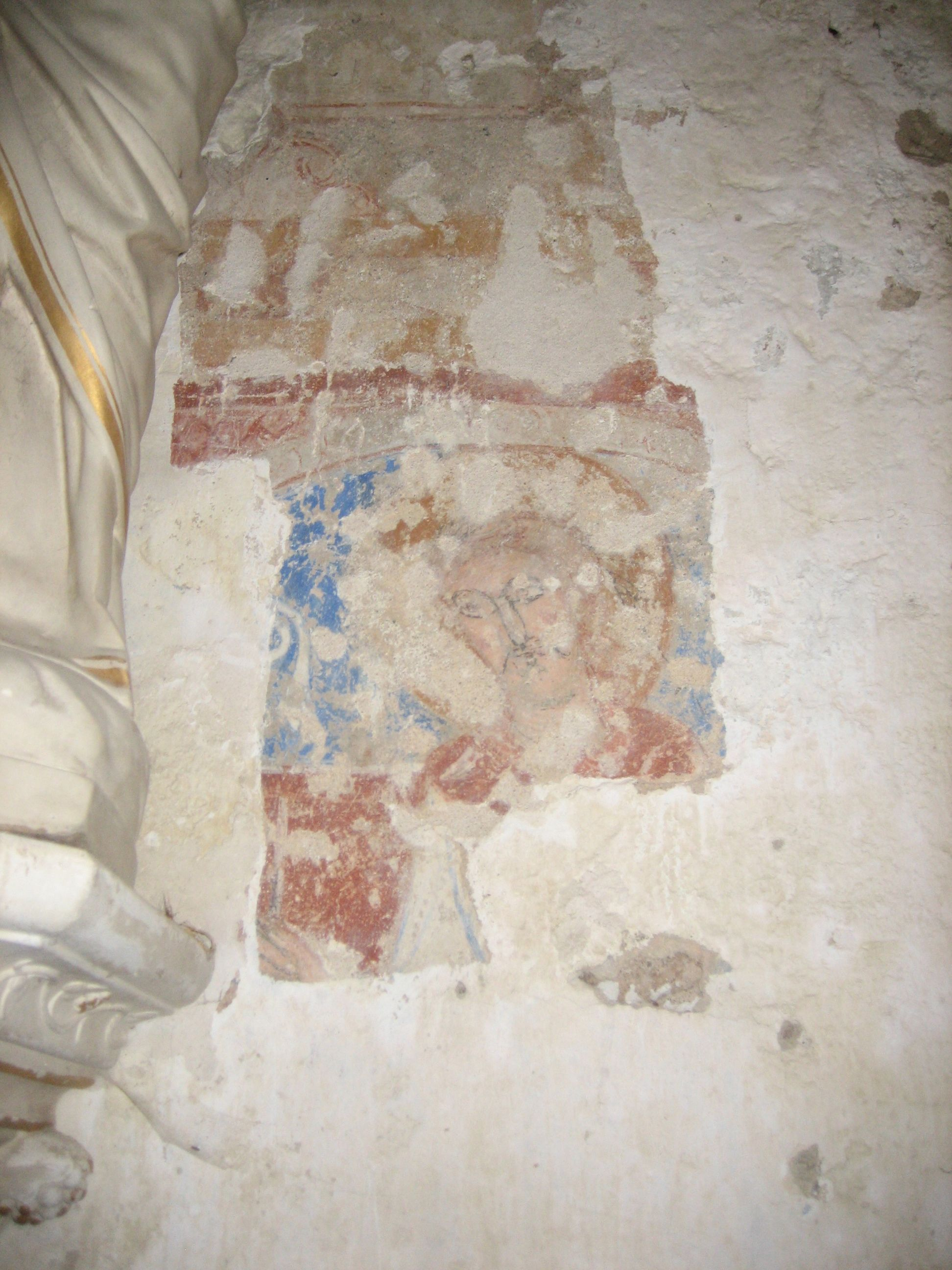 Nohant. Peinture murale dans l'église Sainte-Anne